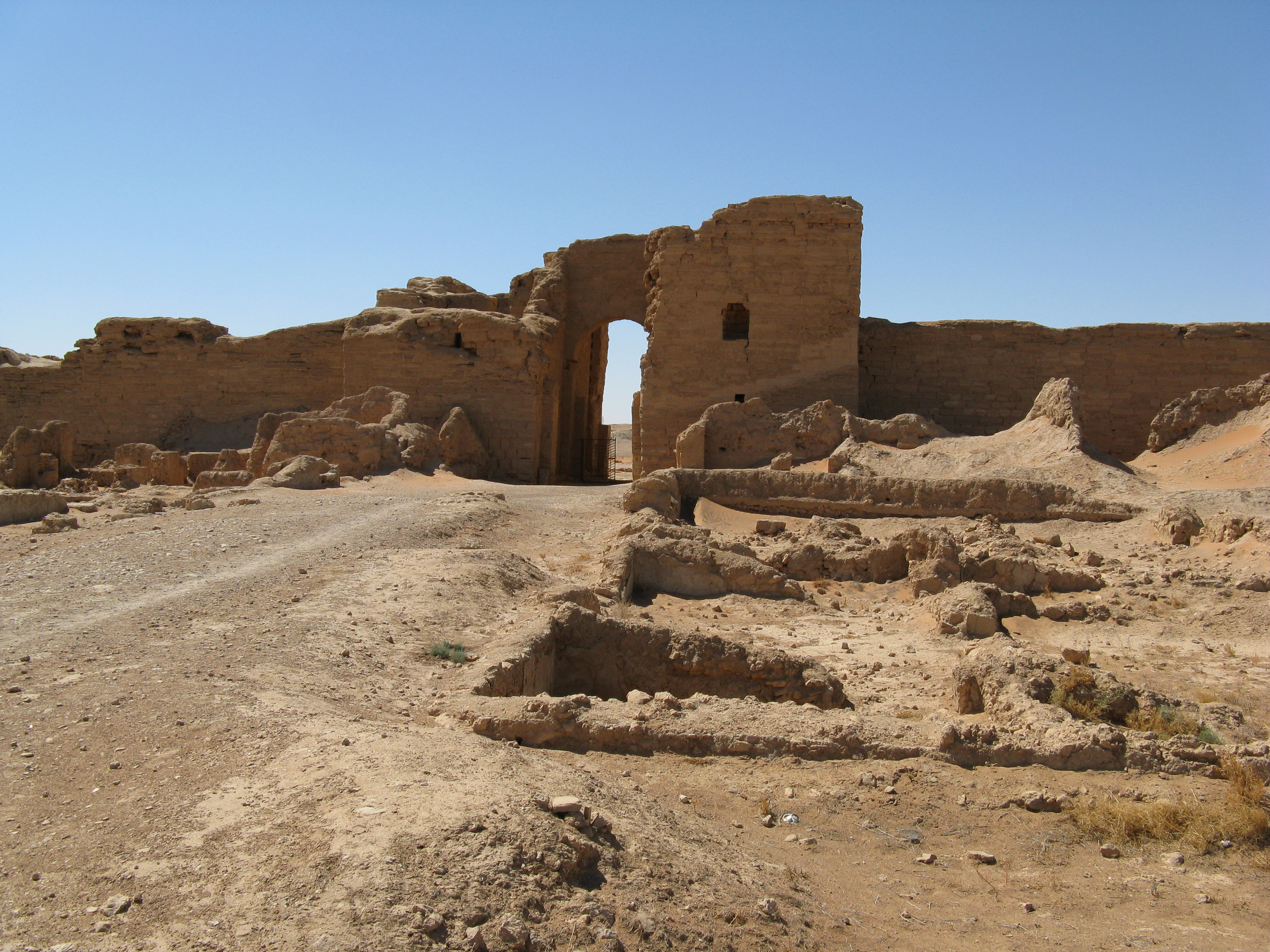 Dura Europos - Palmyra gate